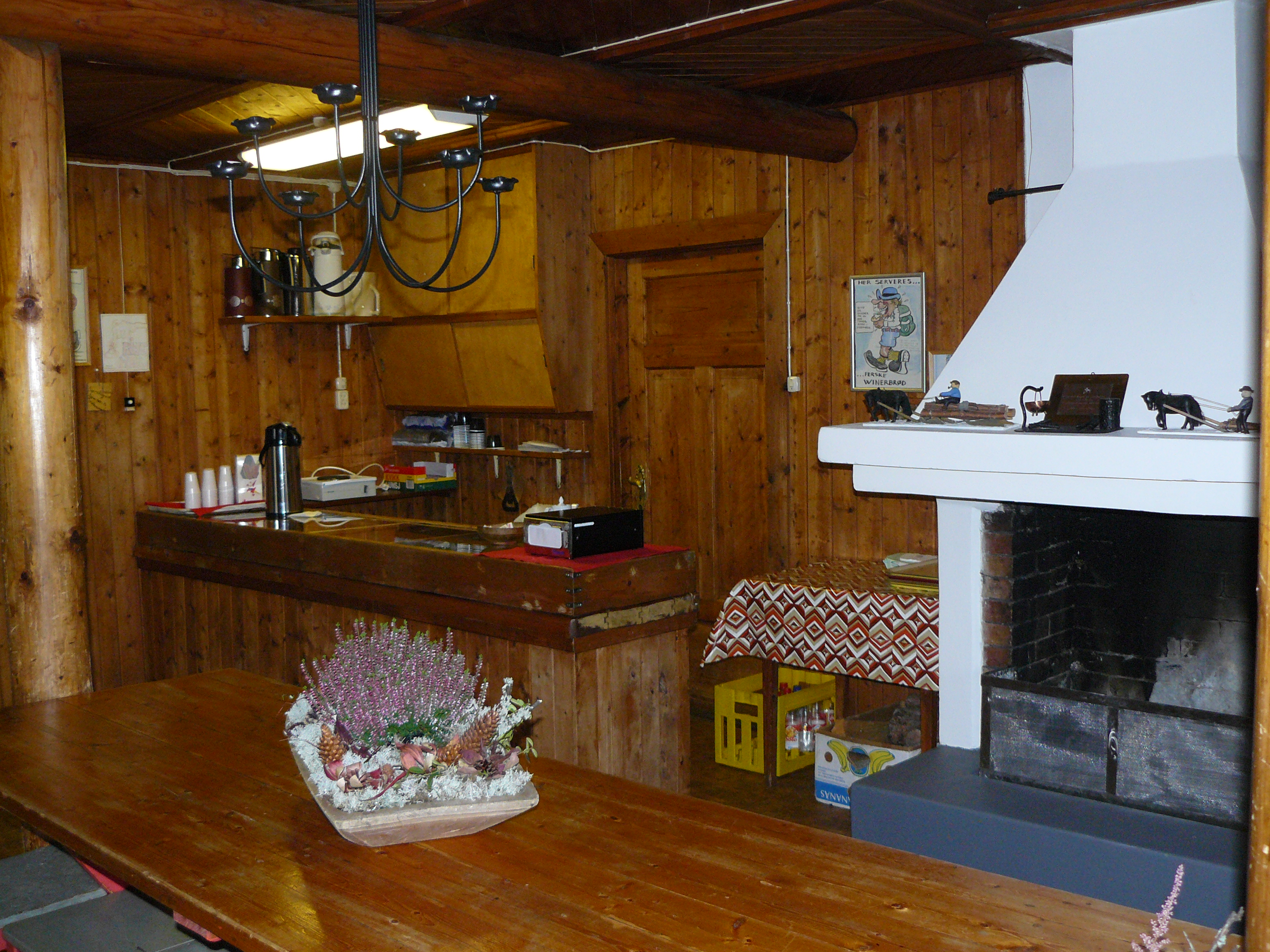 Sørskogen, Lillomarka, Oslo